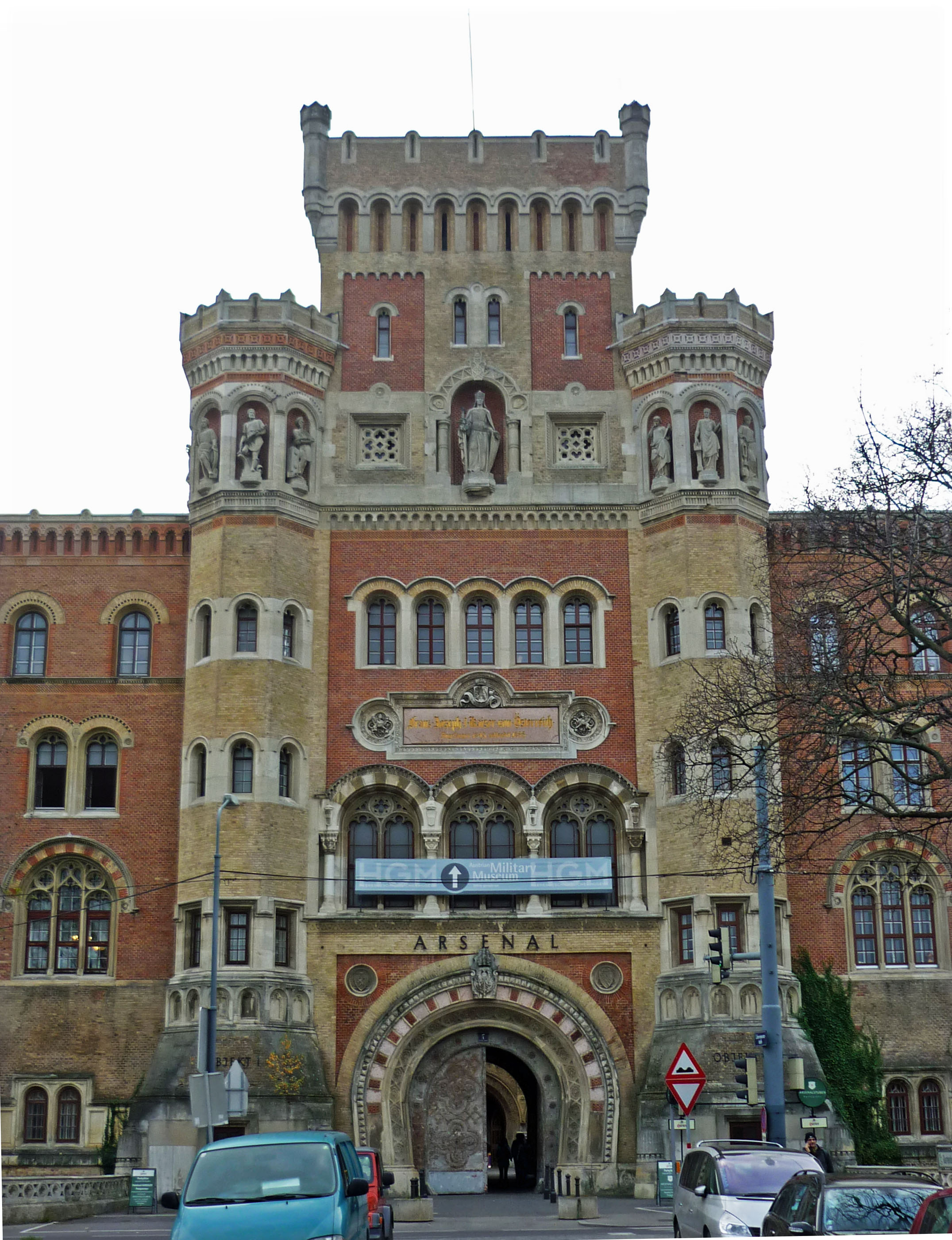 Arsenal Wien, Ghegastraße